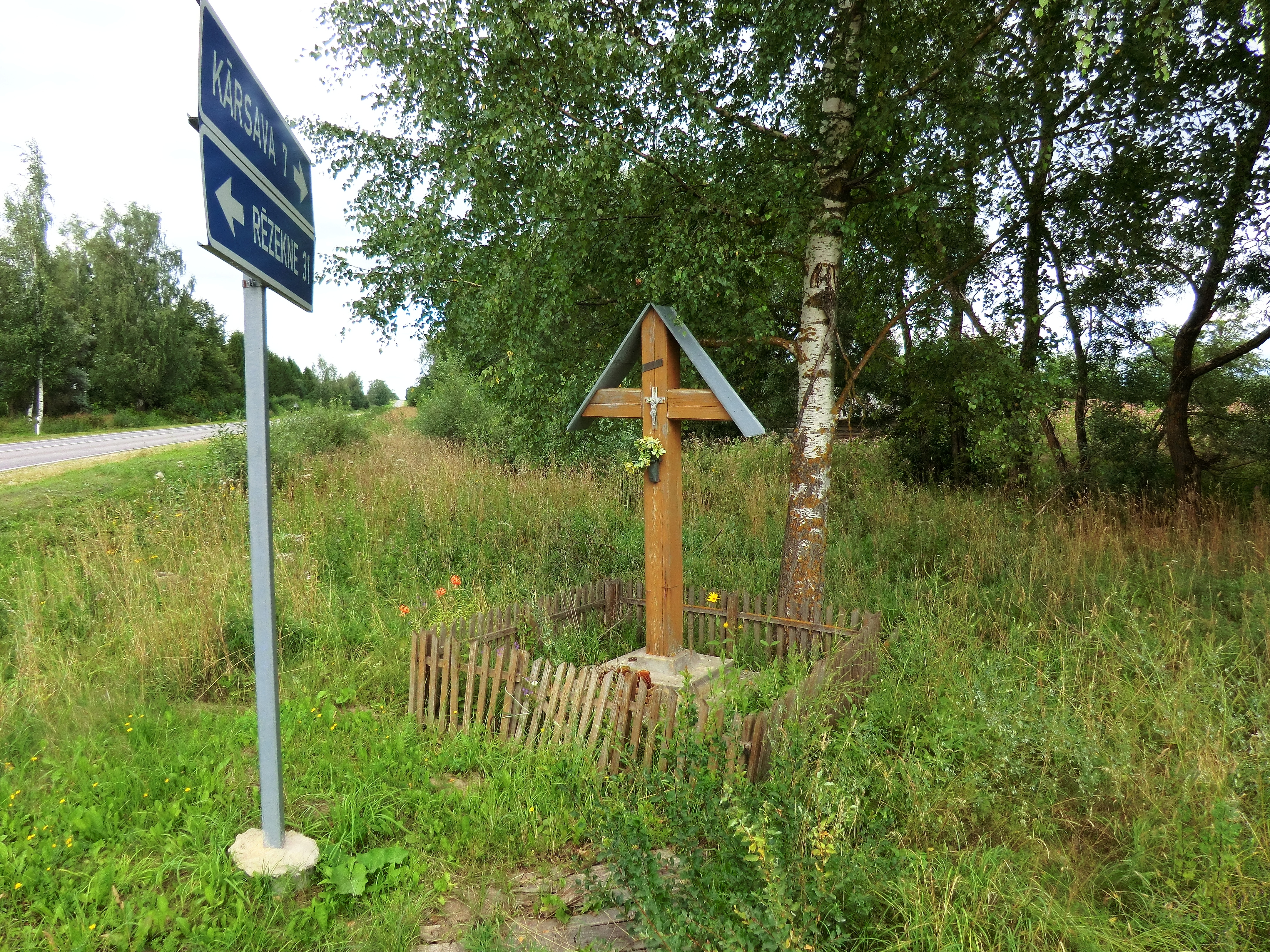 Krucifikss pie autoceļa